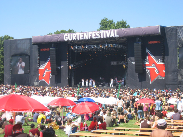 Gurtenfestival 2005 während OpenSeason